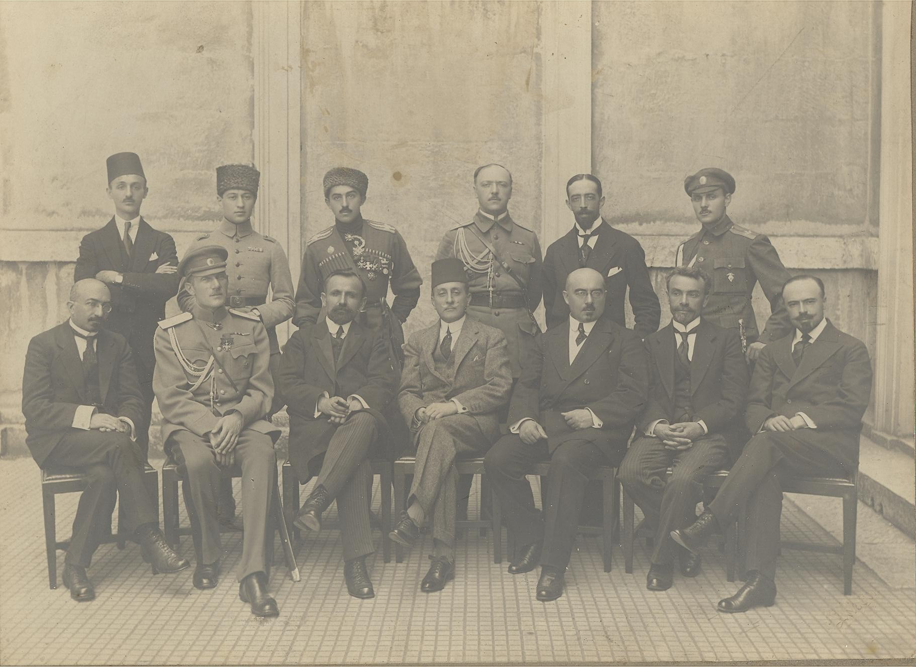 Լուսանկարում՝ ձախից աջ նստած են Գևորգ Խատիսյան, զորավար Գաբրիել Ղորղանյան, Ավետիս Ահարոնյան, Մուխթար բեյ, Ալեքսանդր Խատիսյան, Հակոբ Քոչարյան, Մենտոր Բունիաթյան։ Ձախից աջ կանգնած են թուրք պաշտոնյաներ՝ հավանաբար Նուրի բեյ և Ահմեդ բեյ, ապա՝ Դ․ Շահբաղով, Ա․ Աղաբաբյան, Տ․ Միրզոյան, Լևոն Լիսիցյան, հունիսի 19, 1918, Կ․ Պոլիս